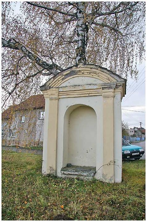 Kaple v obci Hněvčeves, district Hradec Králové autor:Prazak date: 11. 2006